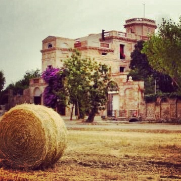 Vista lateral del Molí de la Torre a El Far d'Empordà